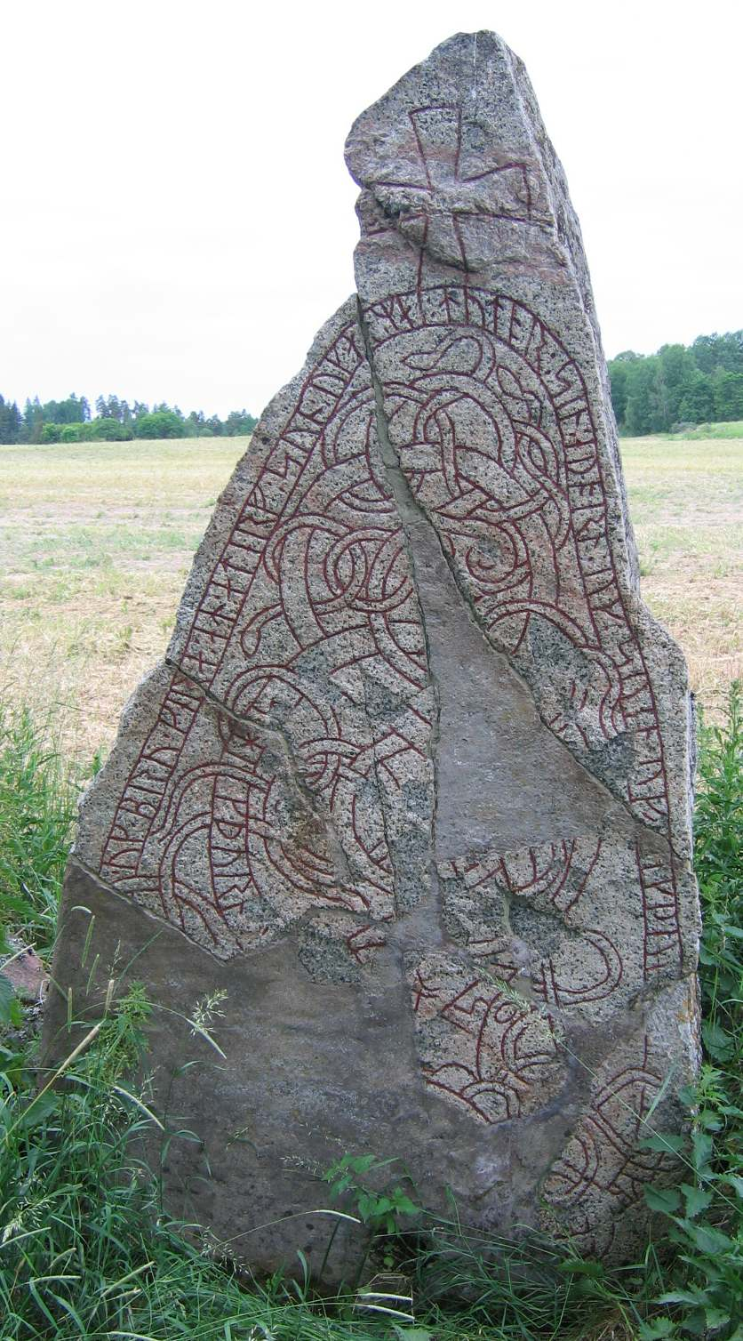 a runestone